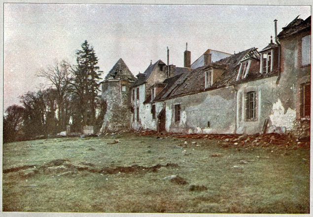 Autochrome in Les Champs de bataille de la Marne par Gervais-Courtellemont intitulée : Marais_de_st-Gond, château Mondement, bibliothèque municaple de Reims sous la référence :_RG_38_N°6_p81.